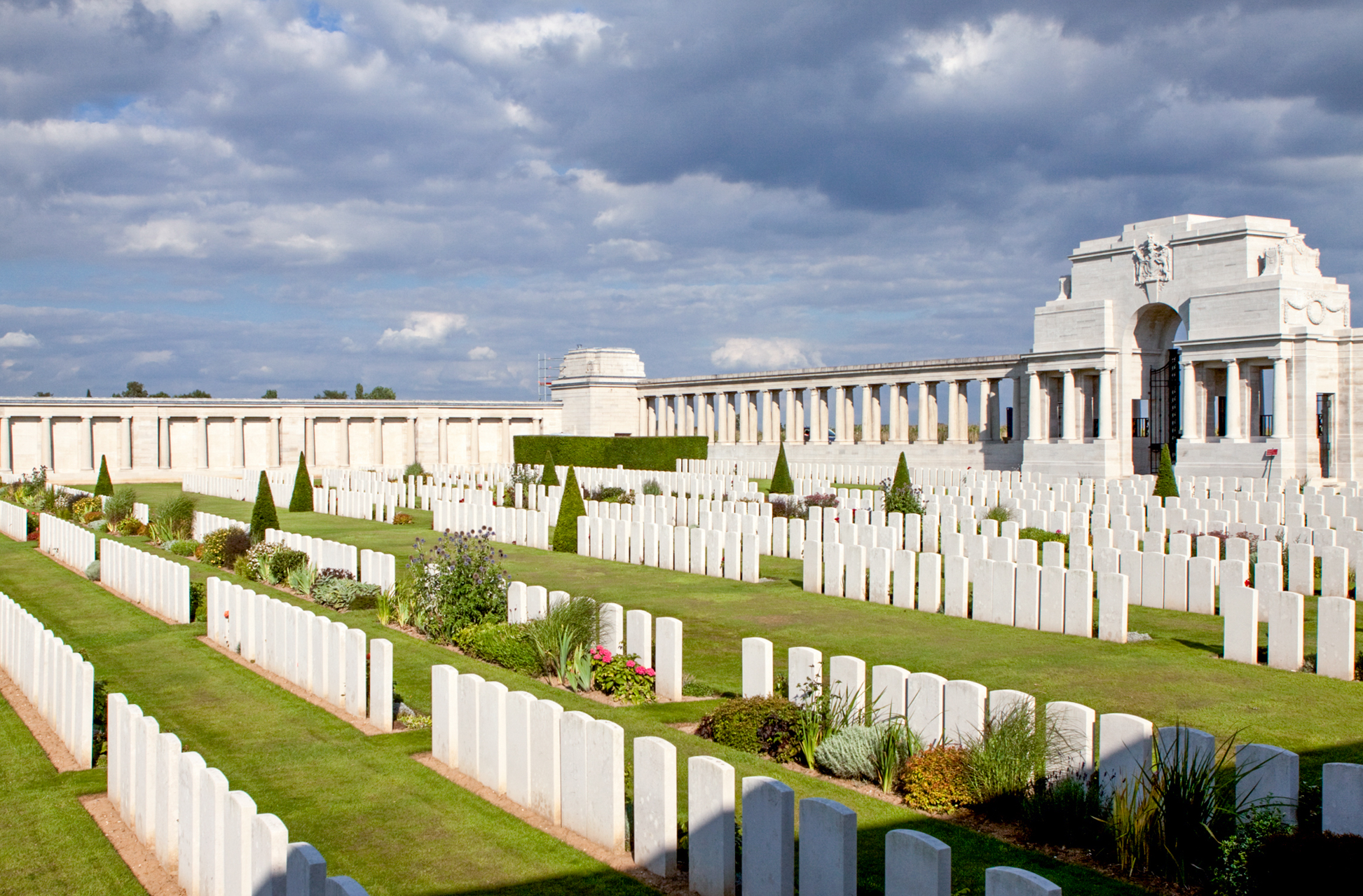 Pozieres British Cemetery